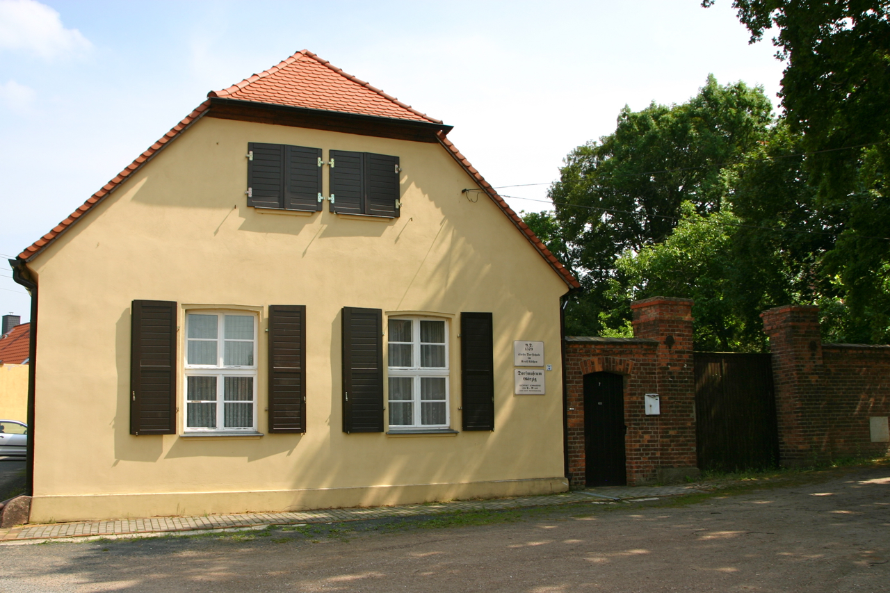 Görzig ist ein Ortsteil der Stadt Südliches Anhalt in Sachsen-Anhalt, Deutschland.